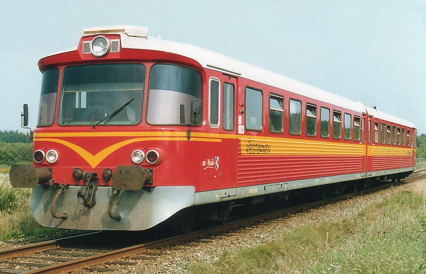 Vestbanen Lynette DMU near Jegum, Denmark